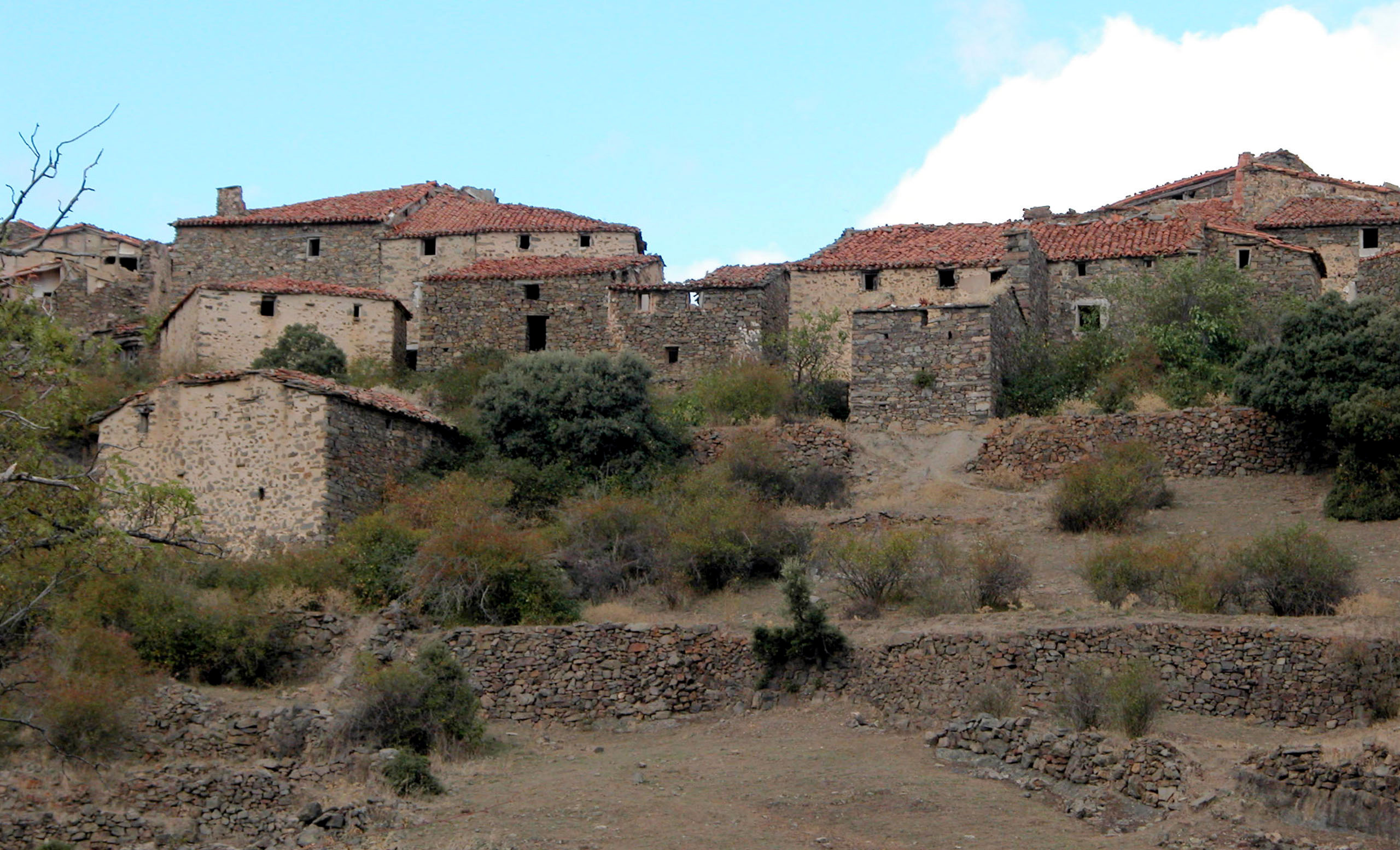 Garranzo, aldea despoblada de Enciso en La Rioja, España.